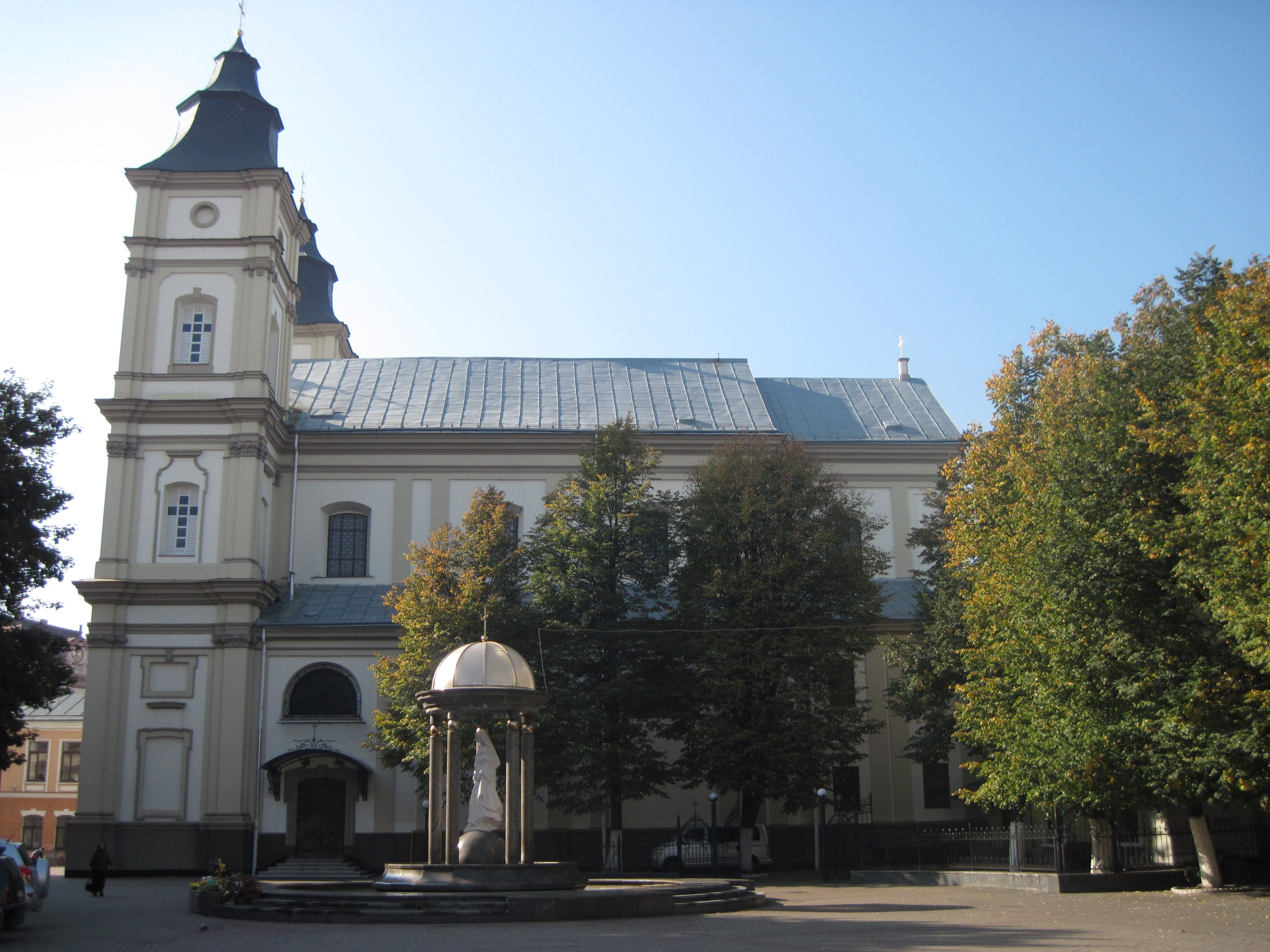 Івано-Франківськ. Катедра УГКЦ. Вигляд з Майдану Шептицького, осінь 2014